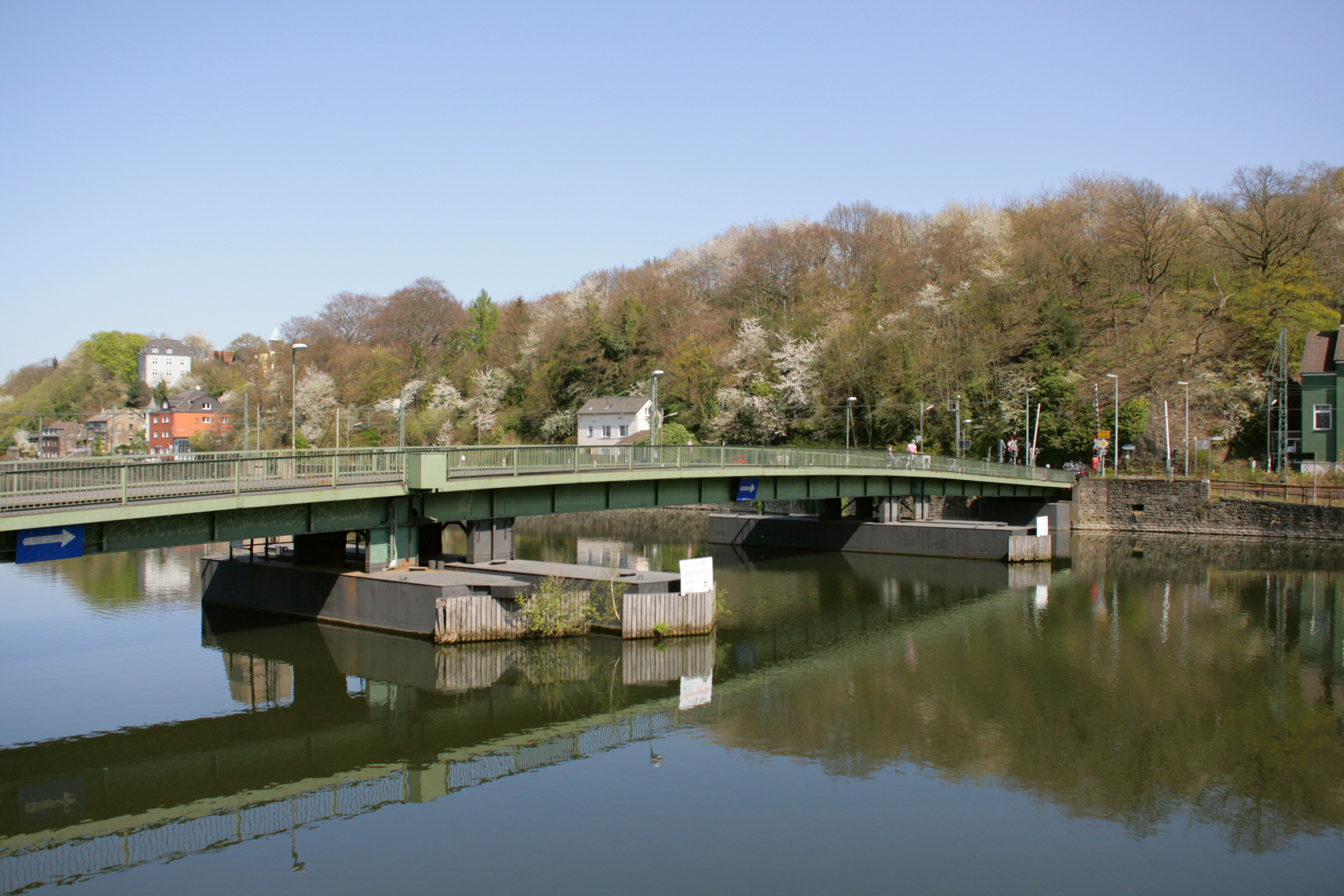 Schwimmbrücke über die Ruhr in Bochum-Dahlhausen